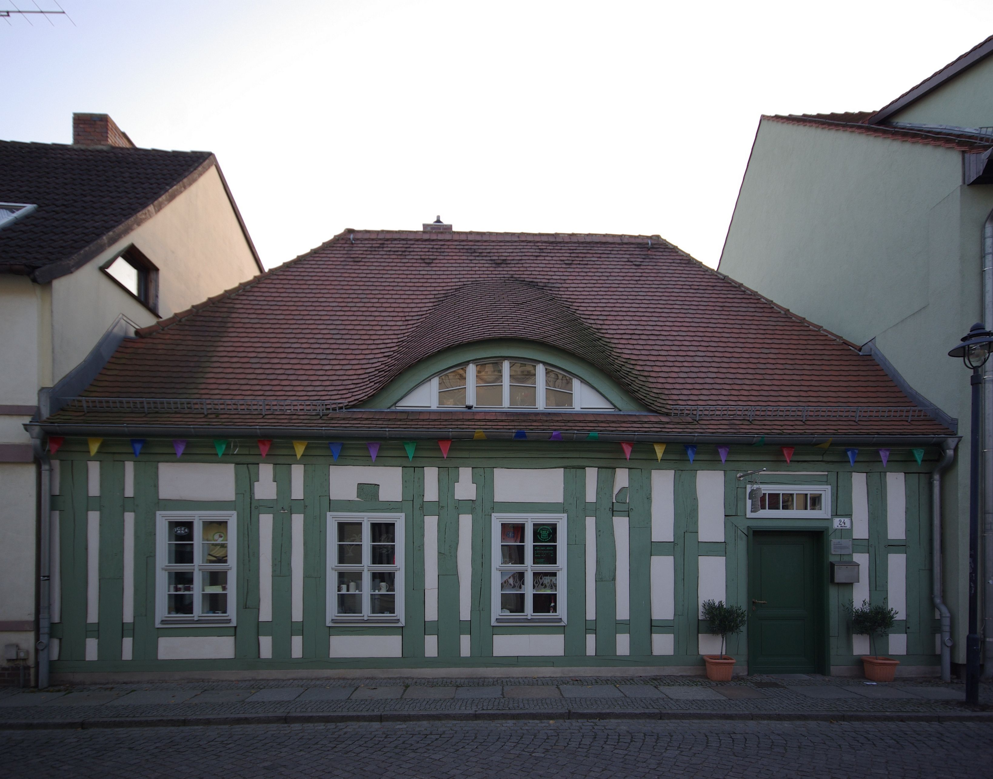 Lübbenau in Brandenburg. Das Haus Ehm-Welk-Straße 24 steht unter Denkmalschutz. Es ist eins der ältesten Häuser der Stadt.